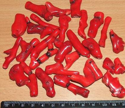 kamień szlachetny: koral - gałązki; autor zdjęcia Grzegorz Framski 20.07.2006r.